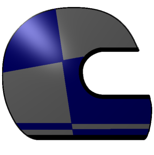 Helmdesign Sebastian Vettel 2007